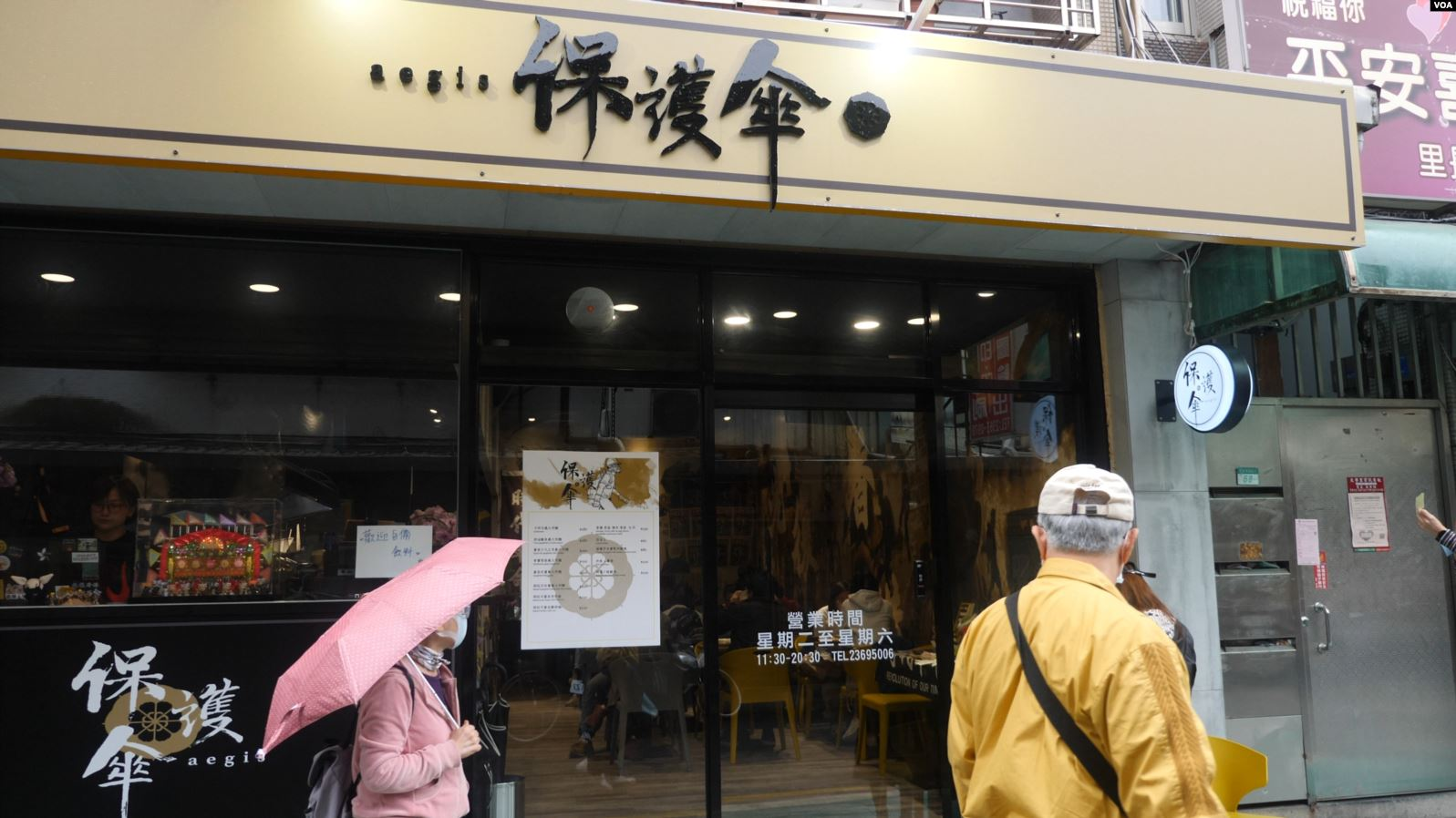 “保护伞”餐厅4月19日于台北开张，由流亡港人经营，提供香港民主斗士来台后一个合法工作的地方